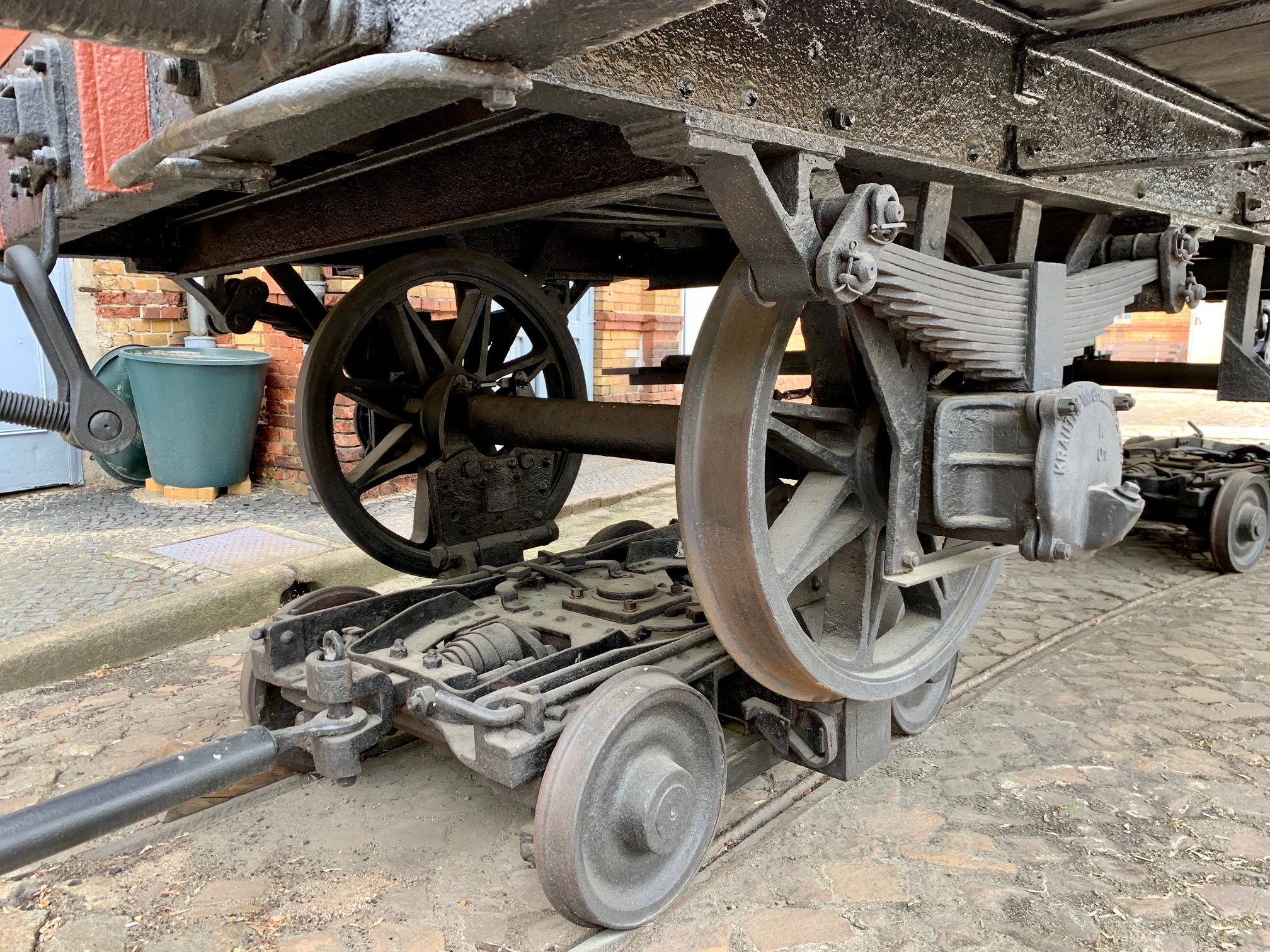 Normalspurachse eines Güterwagens auf Schmalspurgestell (1000 mm) im Brandenburgischen Textilmuseum Forst (Lausitz)